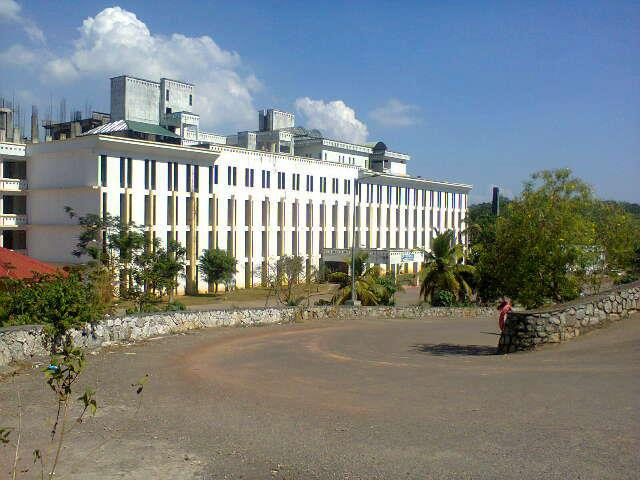 Azeezia Medical College